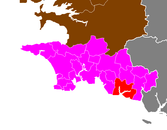 Maps of arrondissements and cantons of France: Arrondissement de Quimper - Canton de Pont-Aven.PNG (Département du Finistère , Arrondissement de Quimper)